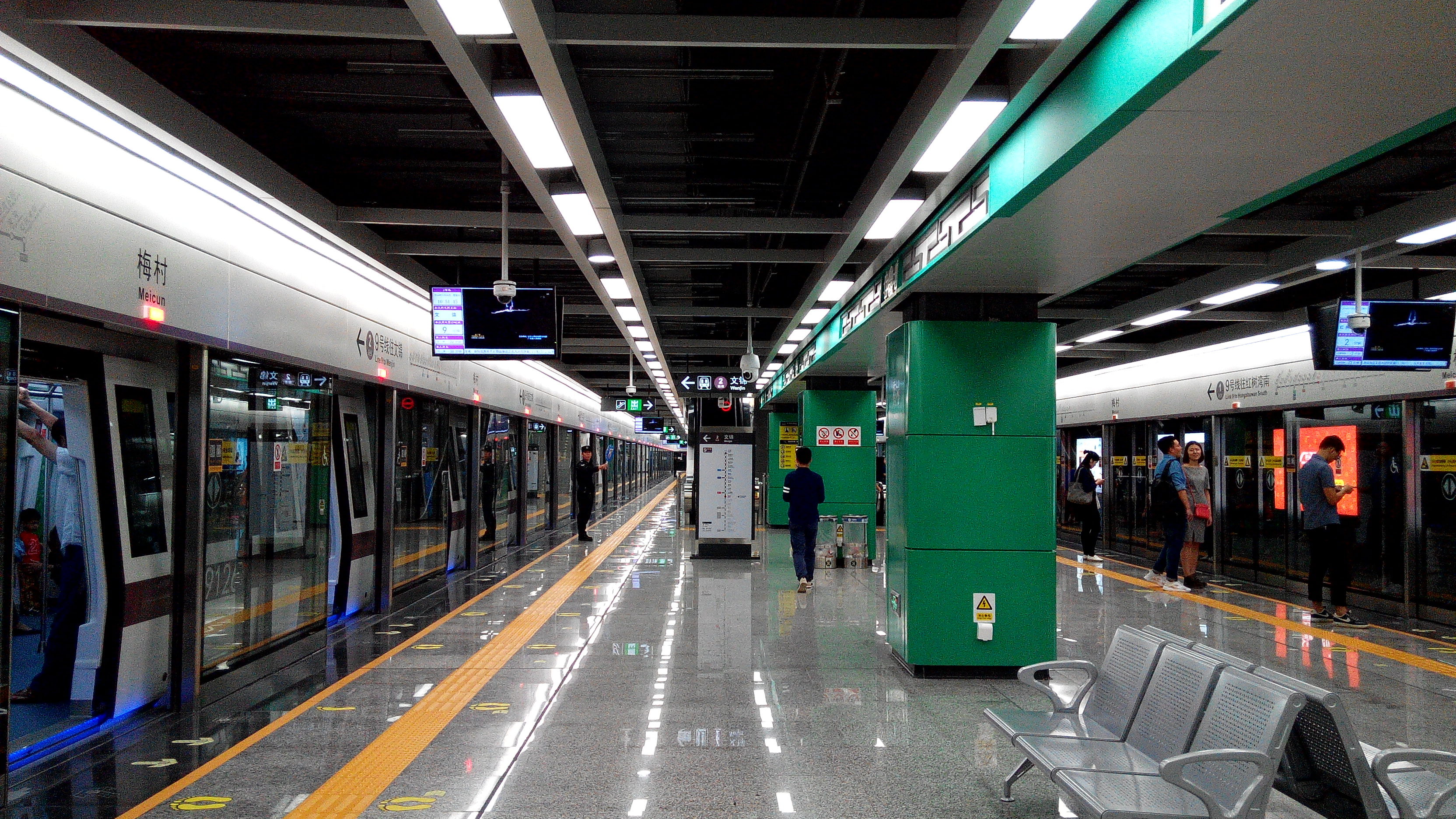 深圳地铁9号线 梅村站站台